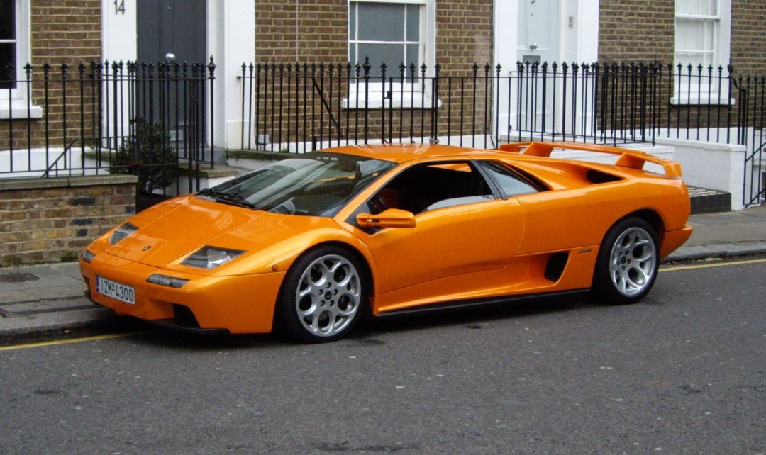 Lamborghini Diablo